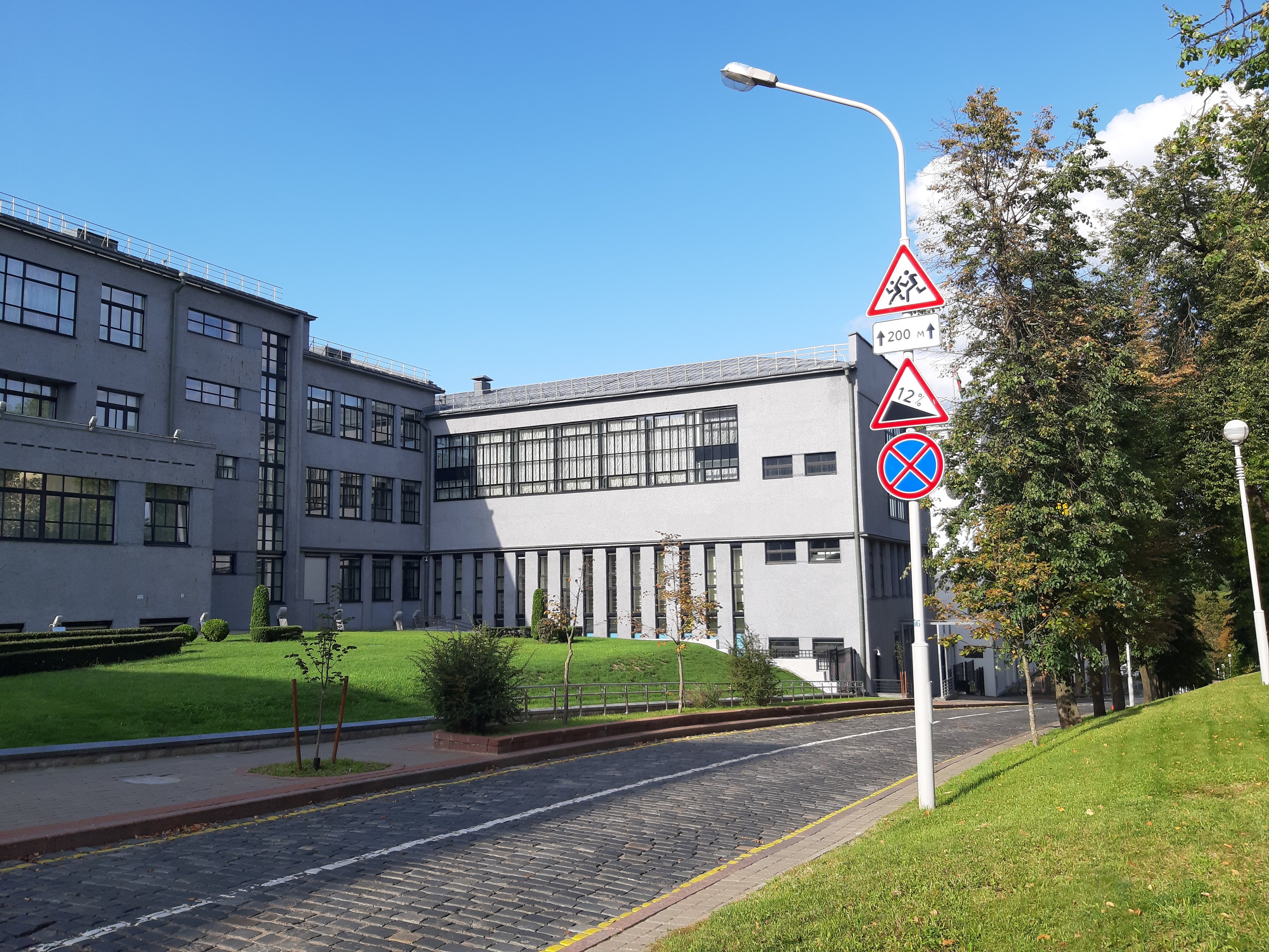 Мінск. Па Чырвонаармейскай